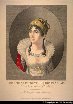 Dessiné par henry Buguet à Paris chez Bouquet, rue du Théâtre Français. Déposé à la Bibliothèque Impériale.Fait partie de La Collection Napoléon de l'Université McGill.